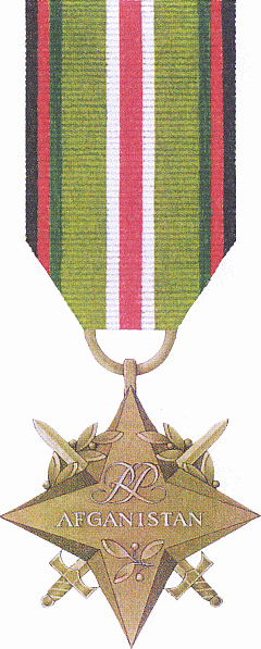 Gwiazda Afganistanu. Awers.